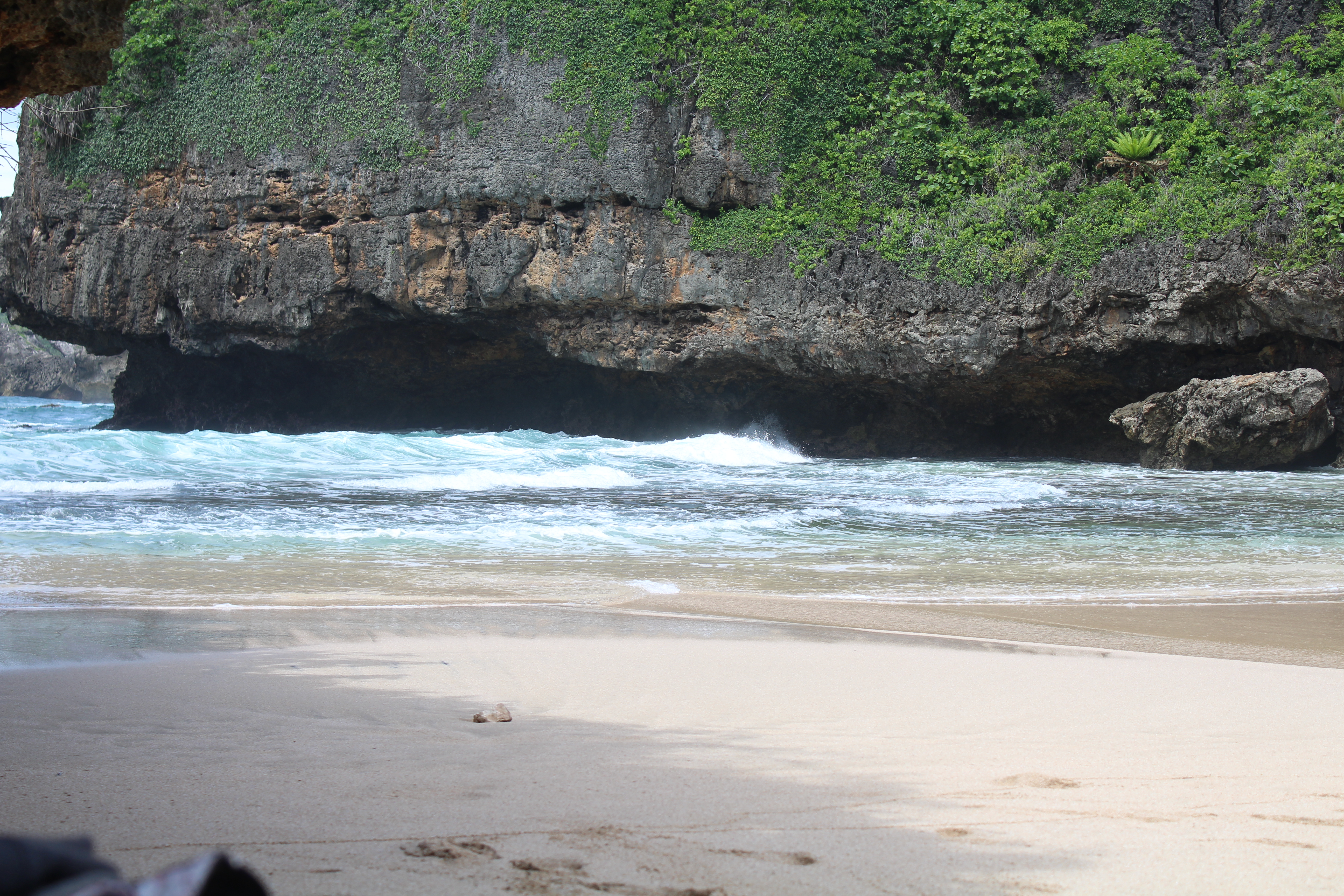 Basa Jawa: Pesisir Gréwéng mapan ana ing Gunung Kidul. Pesisir iku isih katon éndah. Pesisir Gréwéng isih resik. Pesisir iku biasané dinggo kemah marang para nom-noman.